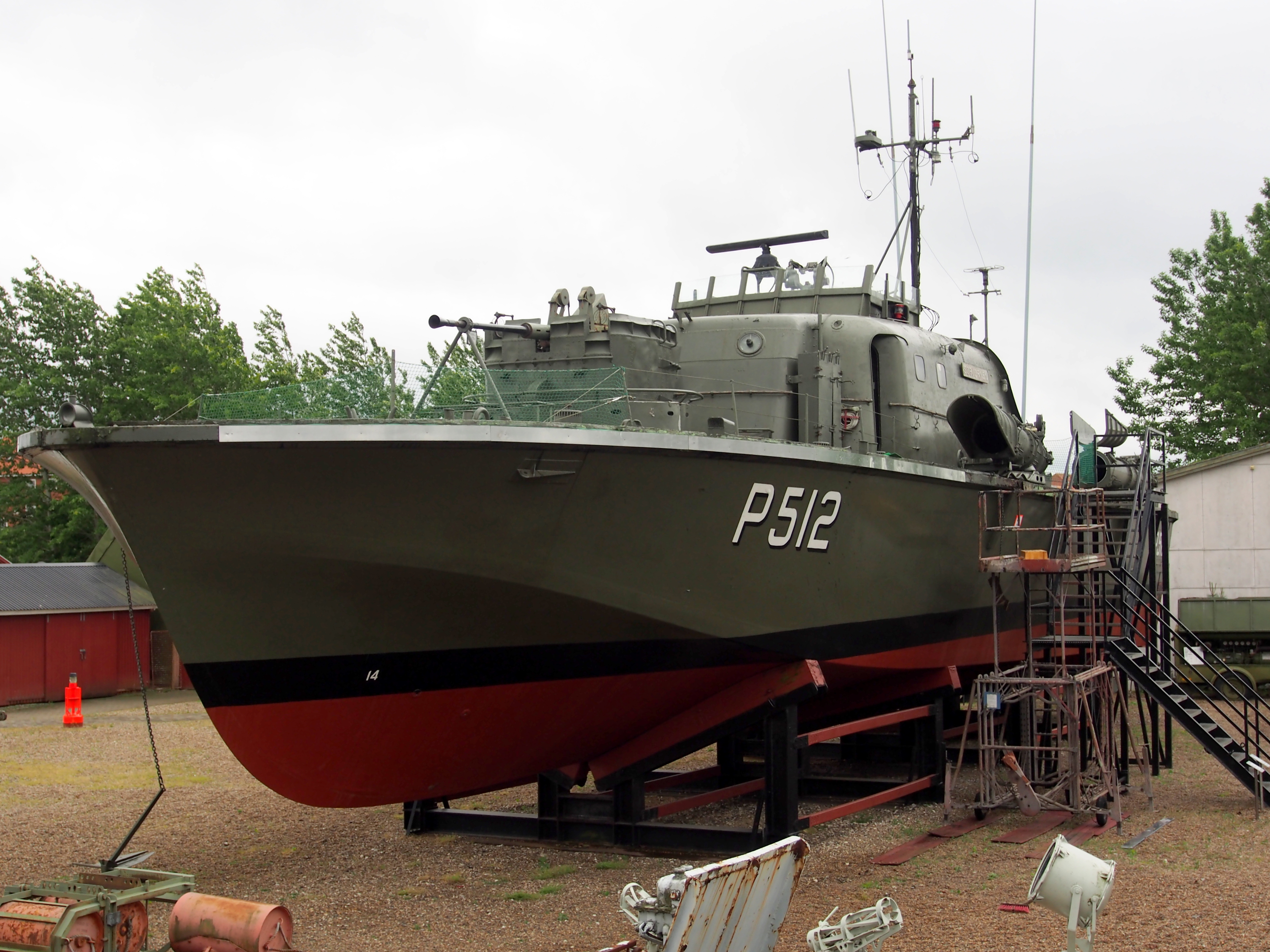 Photographed at Aalborg Søfarts- og Marinemuseum, Denmark.